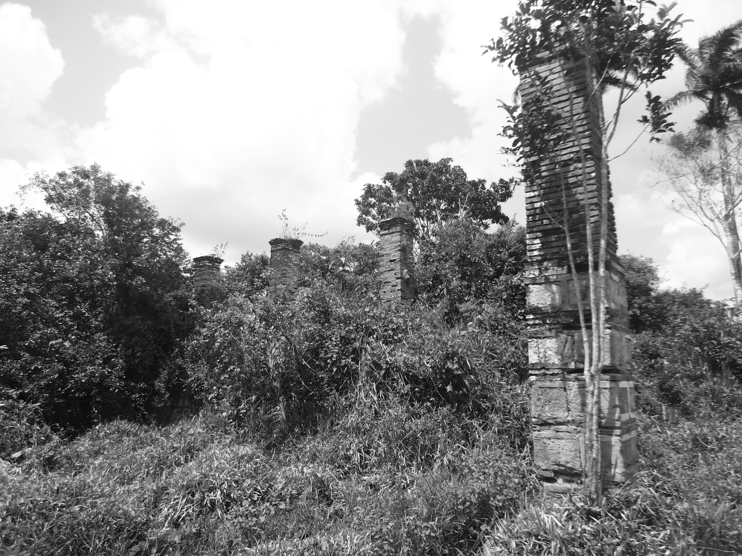 Ruínas do Engenho Pojuca